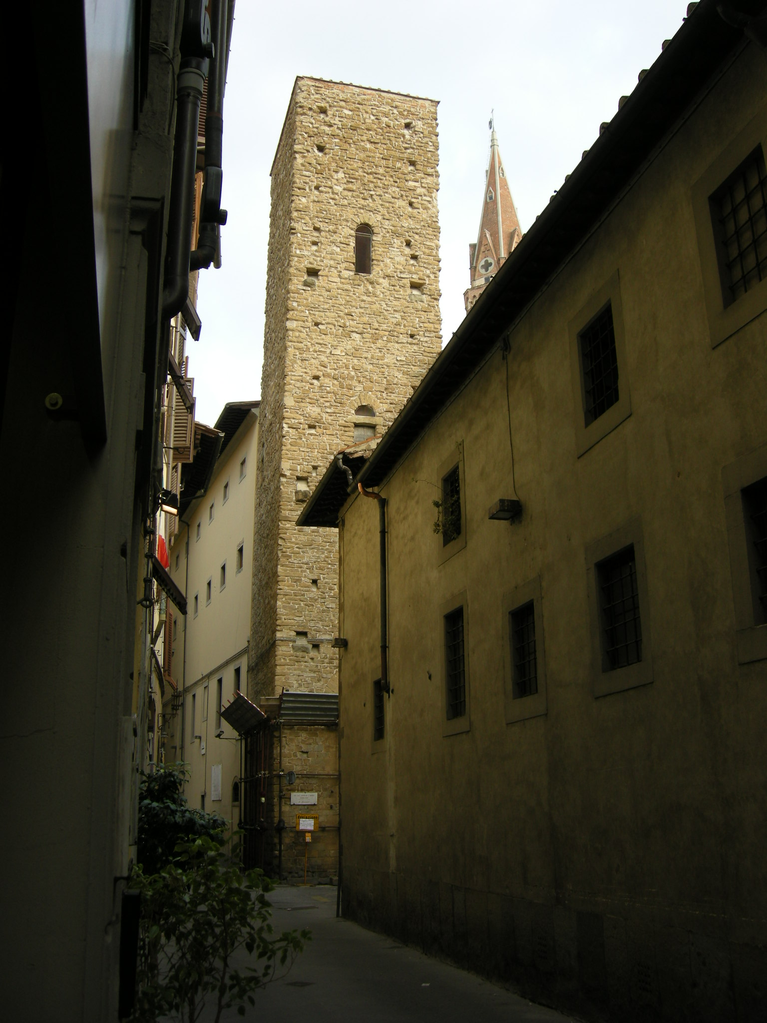 Torre della castagna